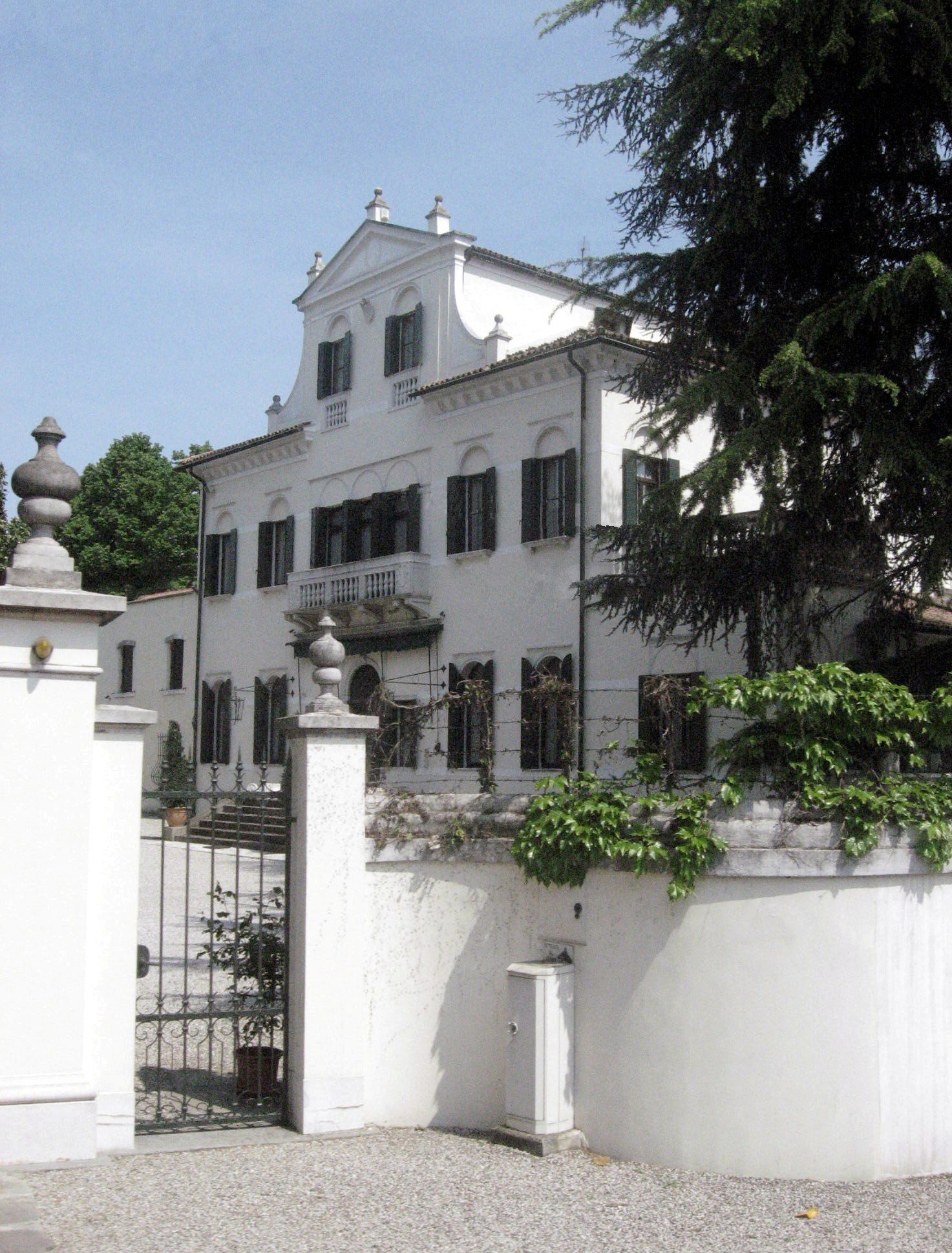 Villa Gussoni Candian a Noventa Padovana